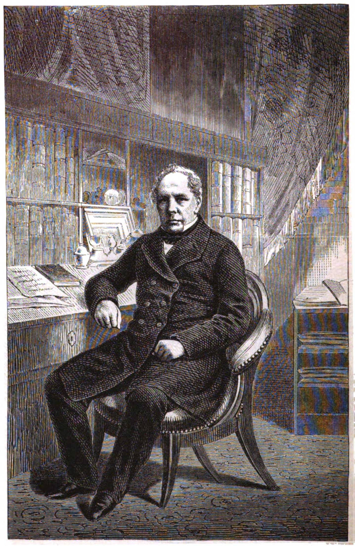 Maximilian Joseph von Chelius, deutscher Augenarzt im 19. Jh.